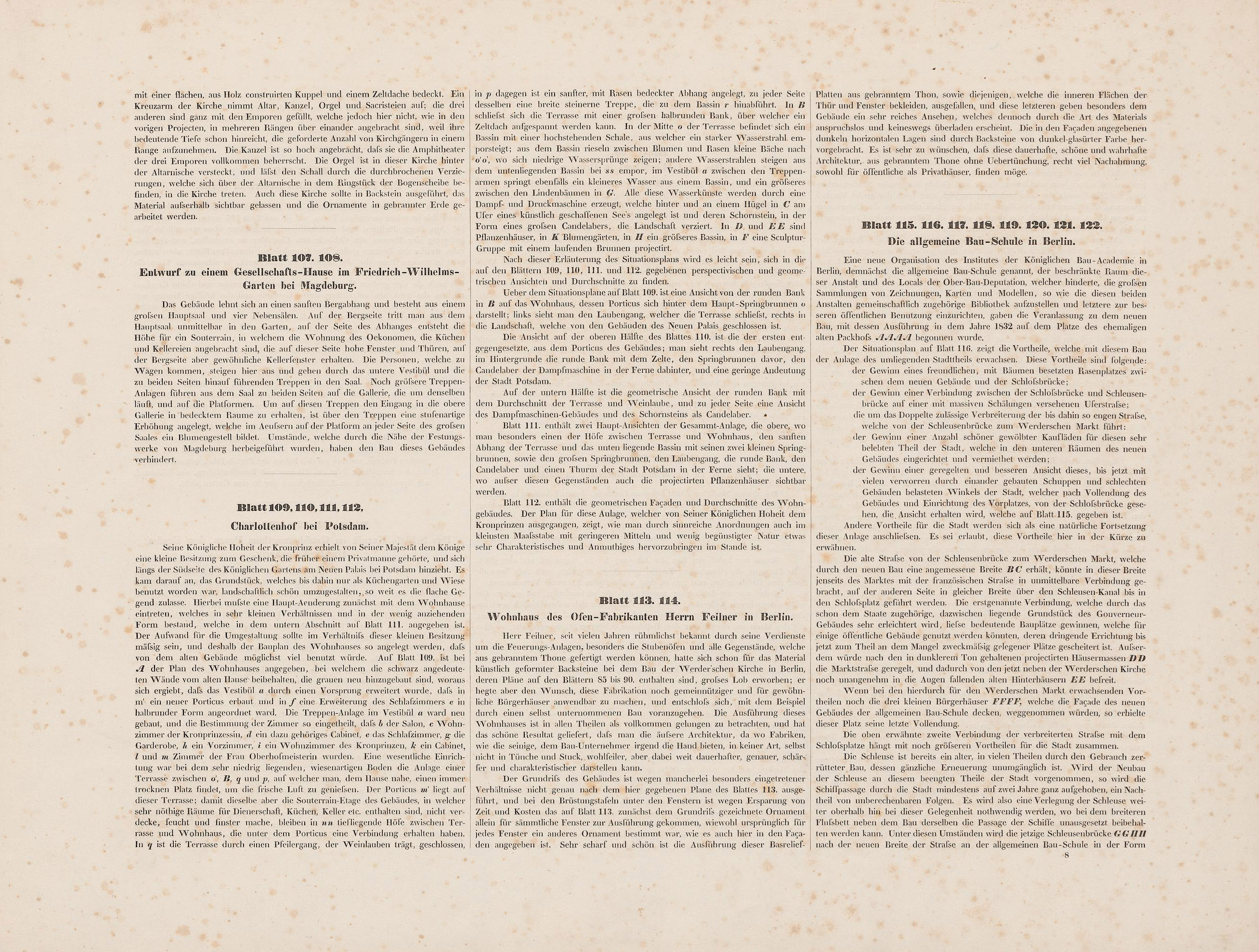 Sammlung architektonischer Entwürfe Schinkels, Textseite